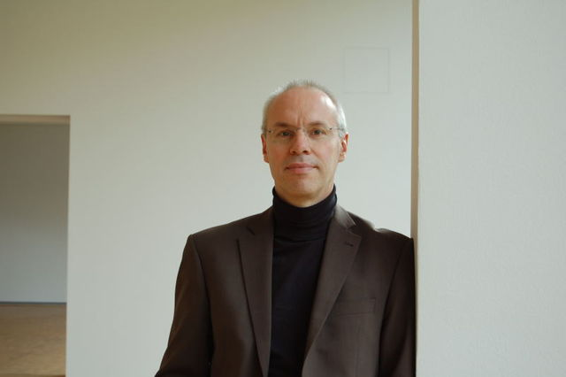 Prof. Dr. Gerd Hurm